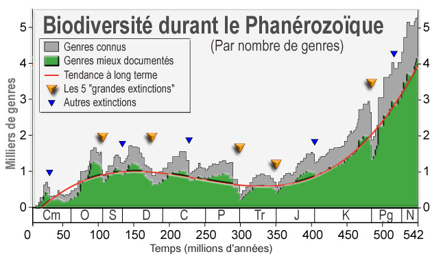 On compte dans le passé 5 crises écologiques majeures. Pour chacune, le temps de résilience a été plus du double de celui de la crise. La crise écologique, qui peut se traduire par de extinctions majeures (on en compte généralement 5, non anthropiques) est un des modèles de crises planétaires. A chaque fois, le temps de résilience a été plus du double de celui de la crise.